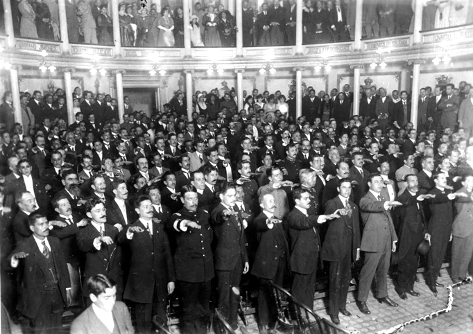 Congreso Constituyente de 1917 jurando la Constitucion Politica de los Estados Unidos Mexicanos el 5 de febrero de 1917.